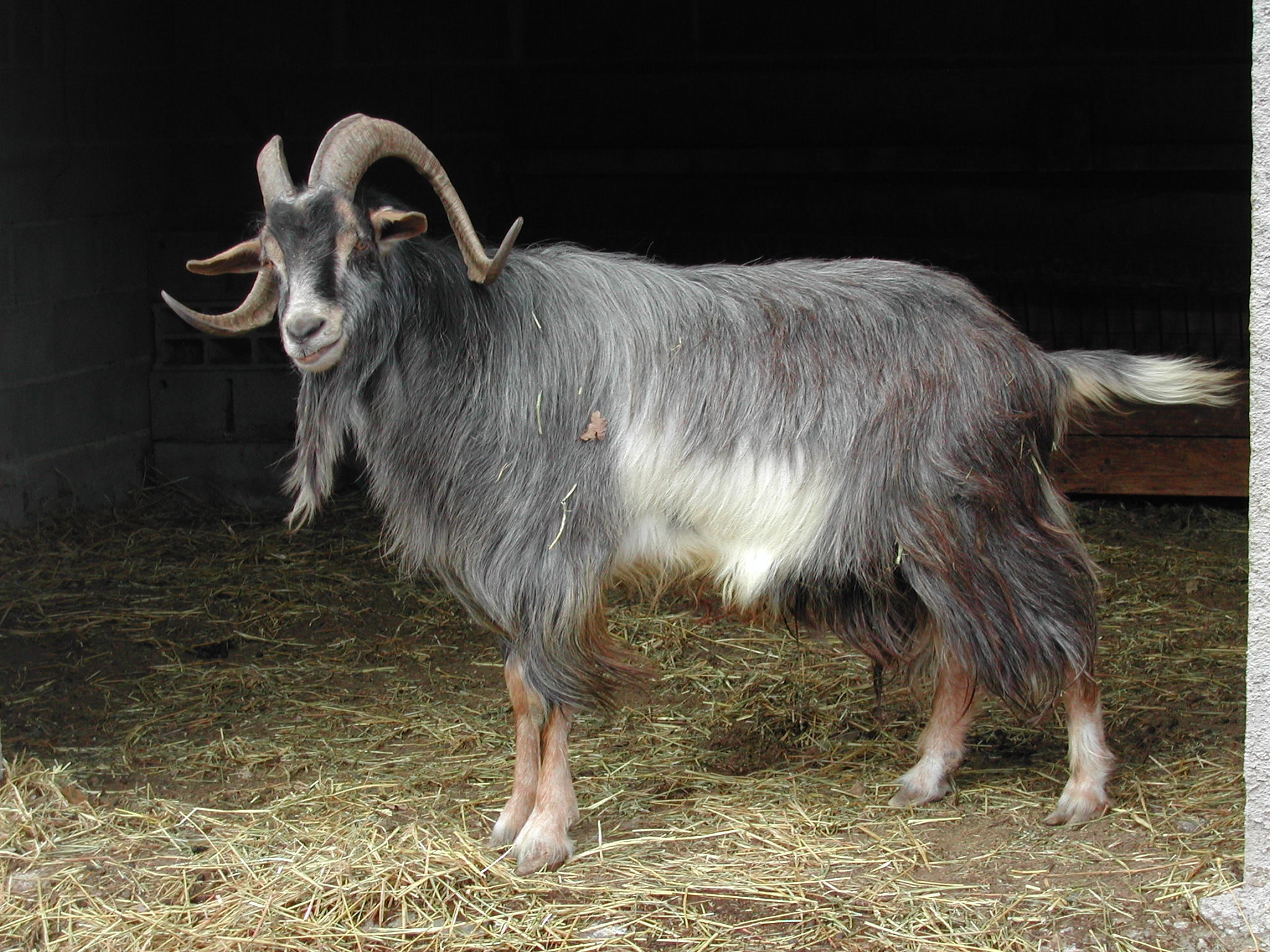 bouc de la race commune provençale